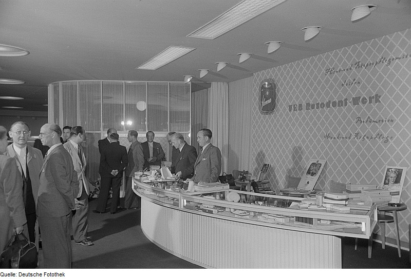 Original image description from the Deutsche Fotothek Besucher am Stand des VEB Rosodont Werk Waldheim (ehemals Florena), Herbstmesse 1953